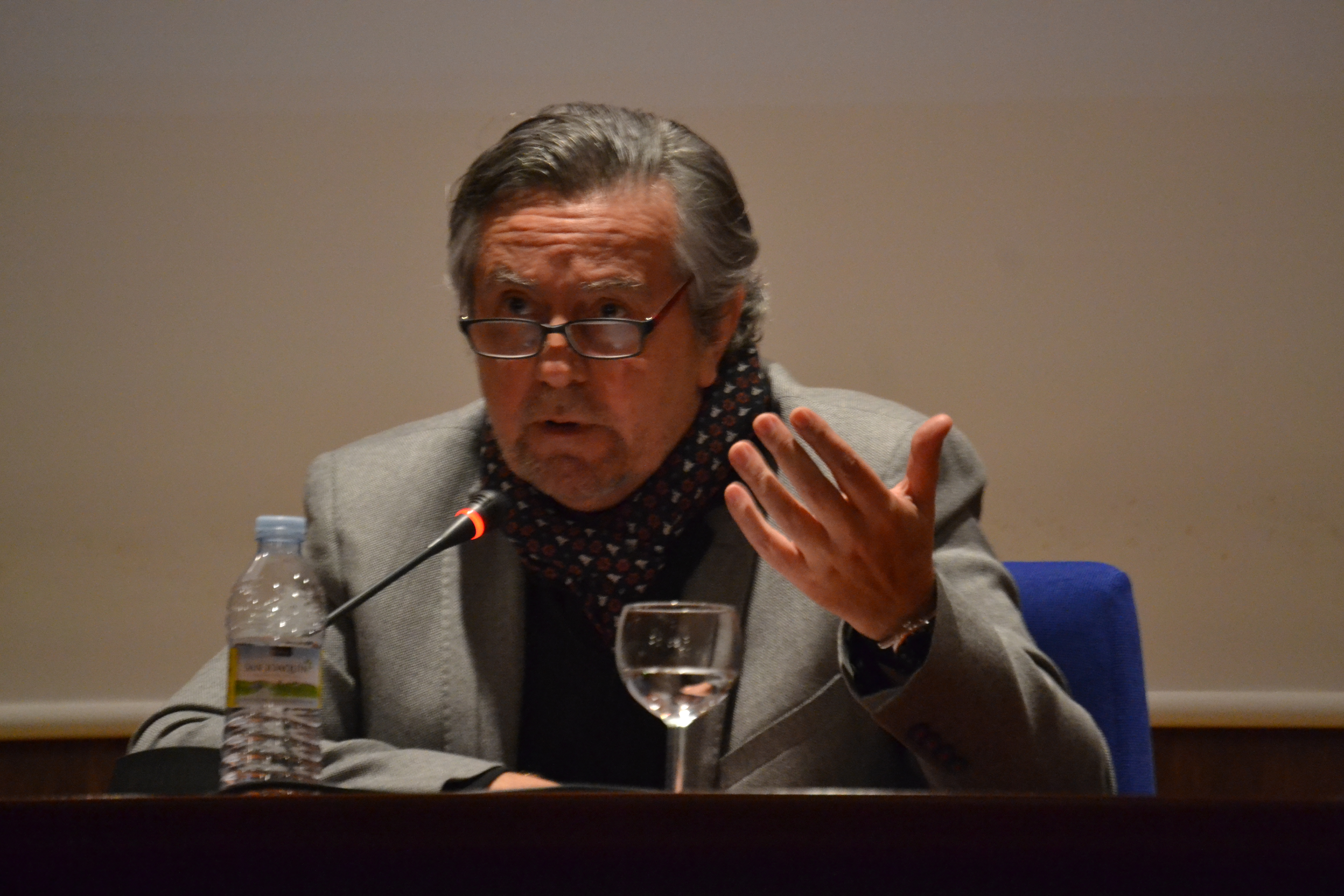 Conferencias ExiliArte en la Fundación Rafael Alberti de El Puerto de Santa María. Febrero de 2019.